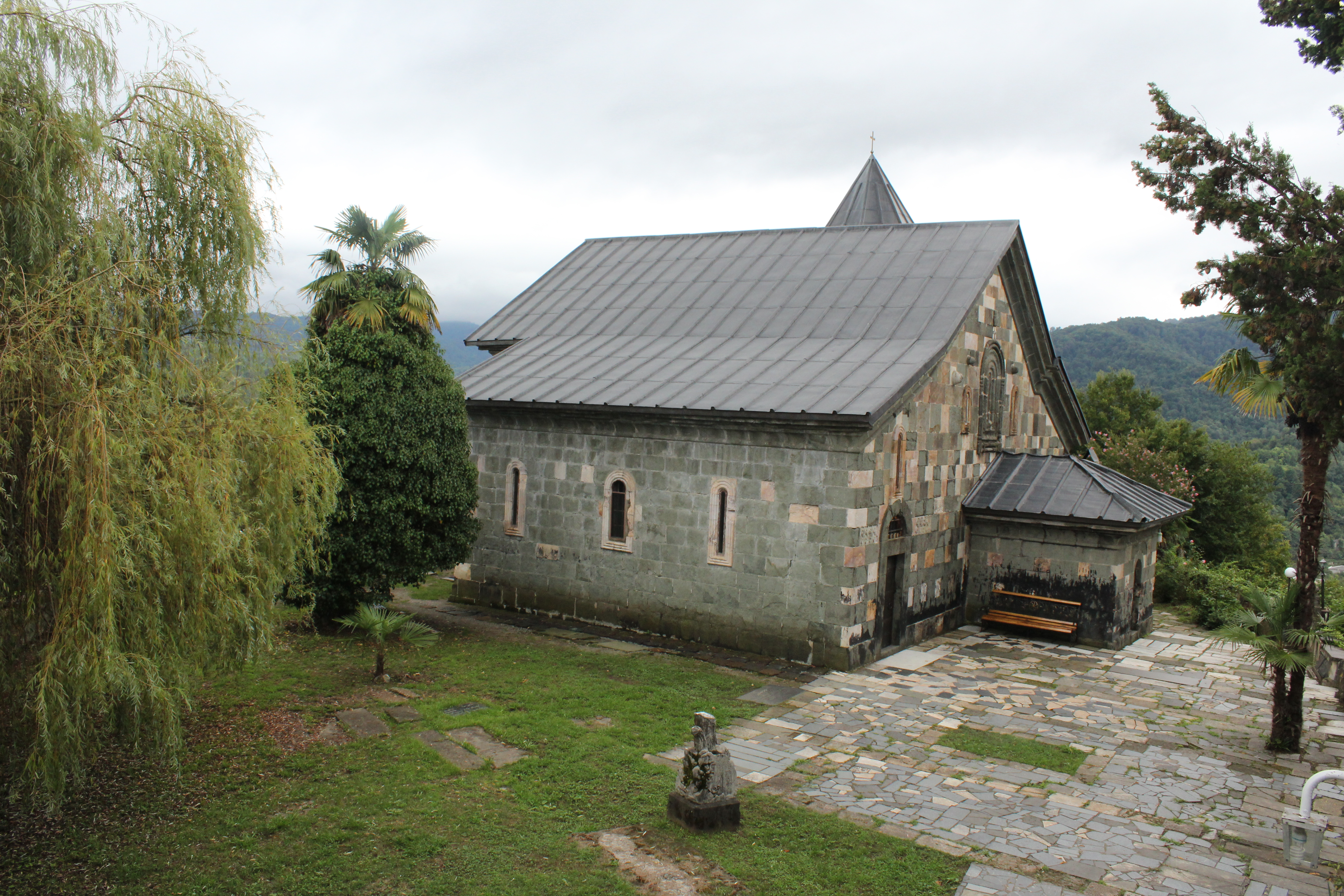 შემოქმედის კომპლექსი